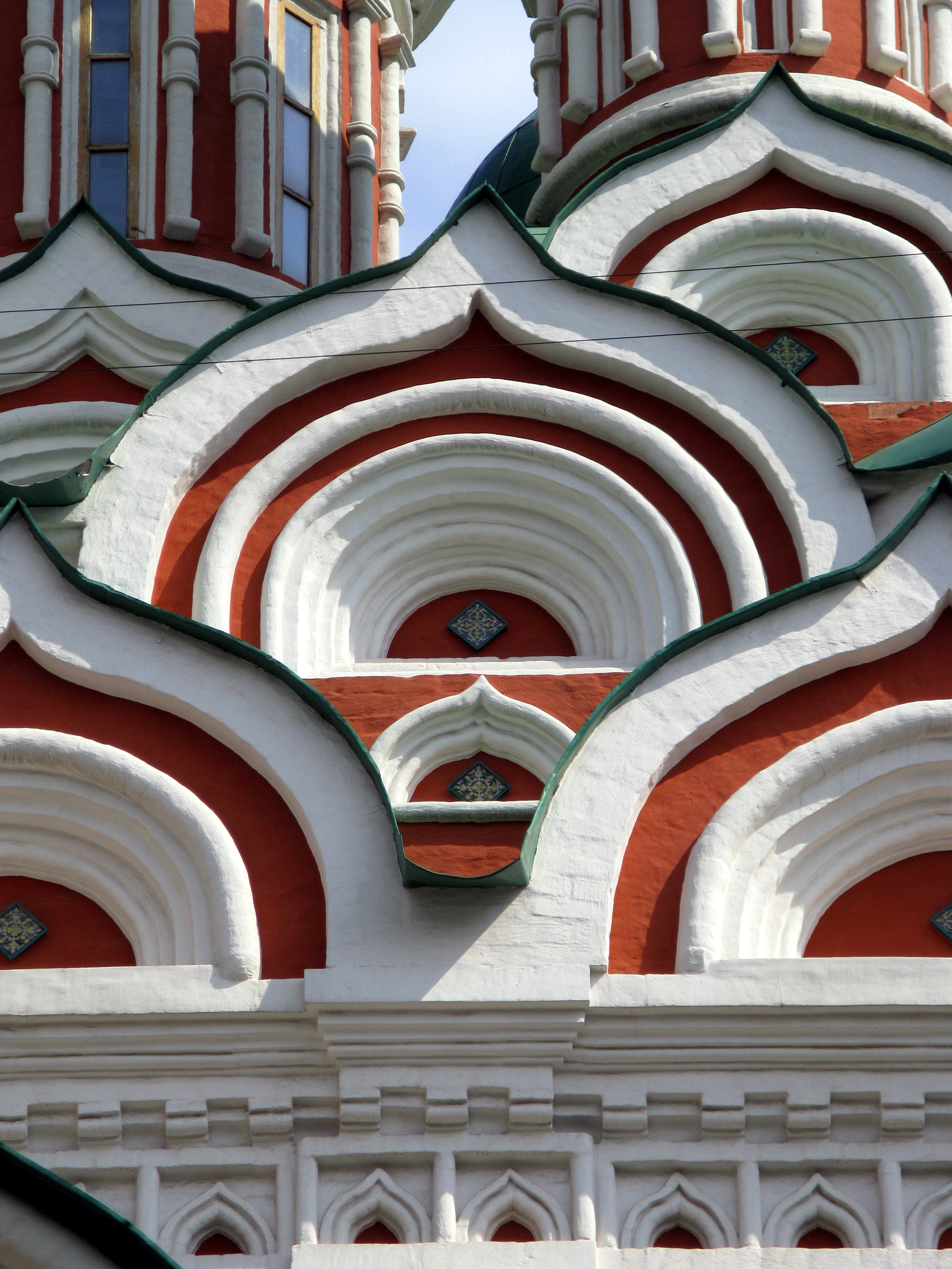 Храм Троицы Живоначальной в Никитниках (Грузинской иконы Божией Матери на Варварке)